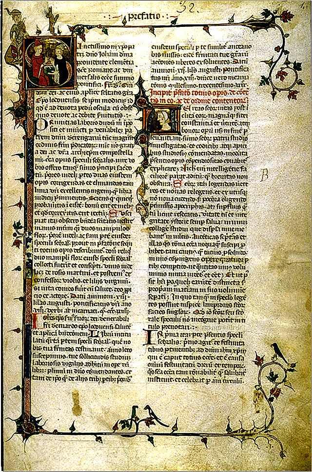 Bernard Gui remettant son ouvrage à Jean XXII